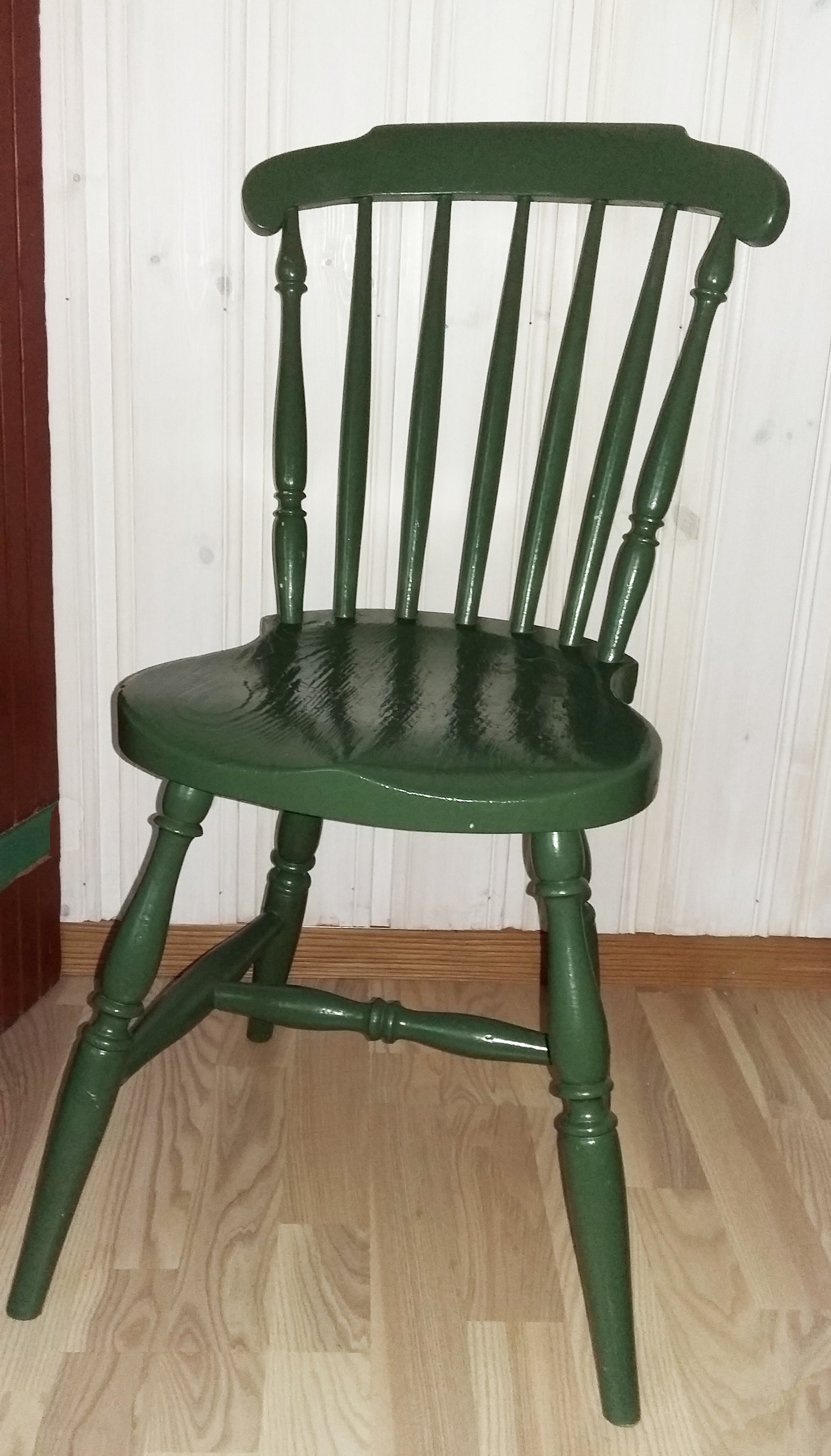 Pinnestol fra Budal. Denne typen ble kalt "jønkjøping"